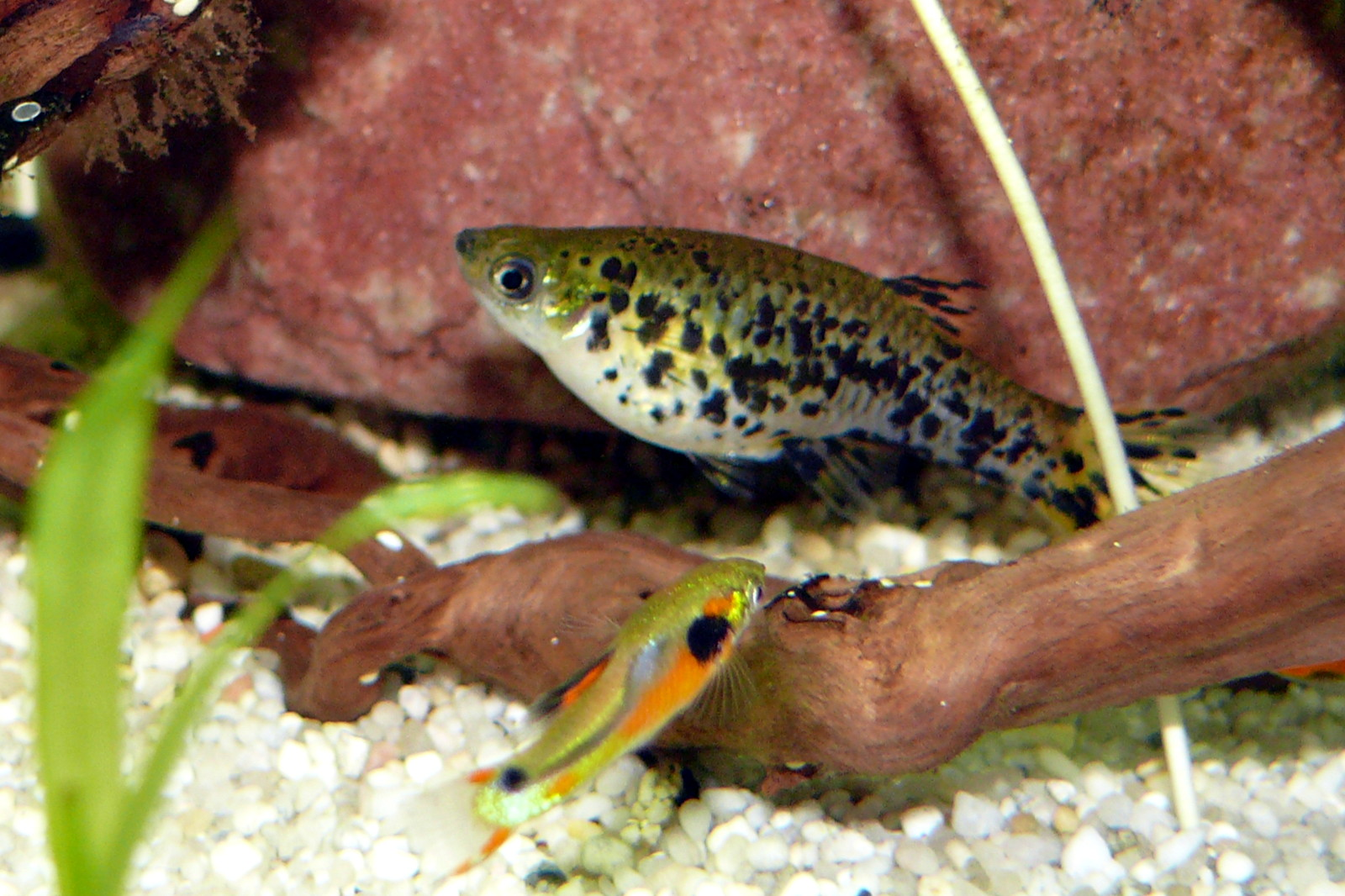 Kaudi (Phalloceros caudimaculatus)